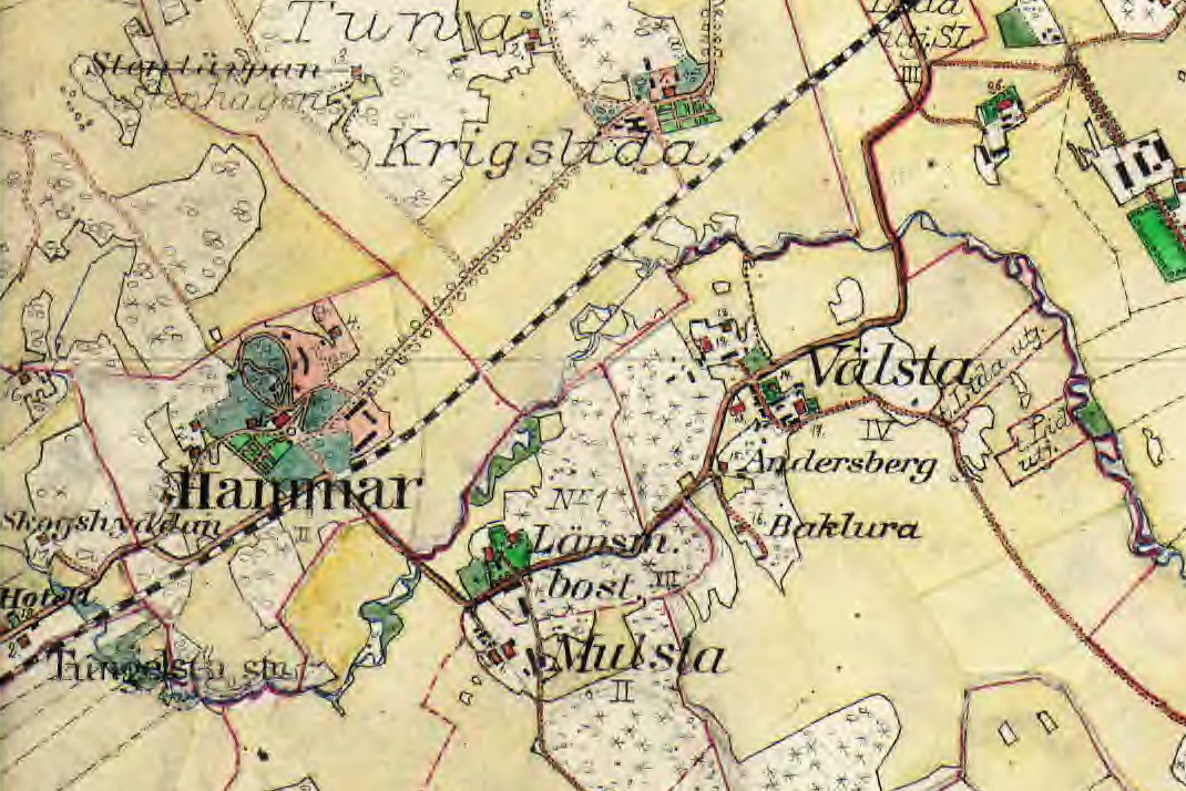 Hammar, Mulsta och Välsta i Västerhaninge på Häradsekonomiska kartan